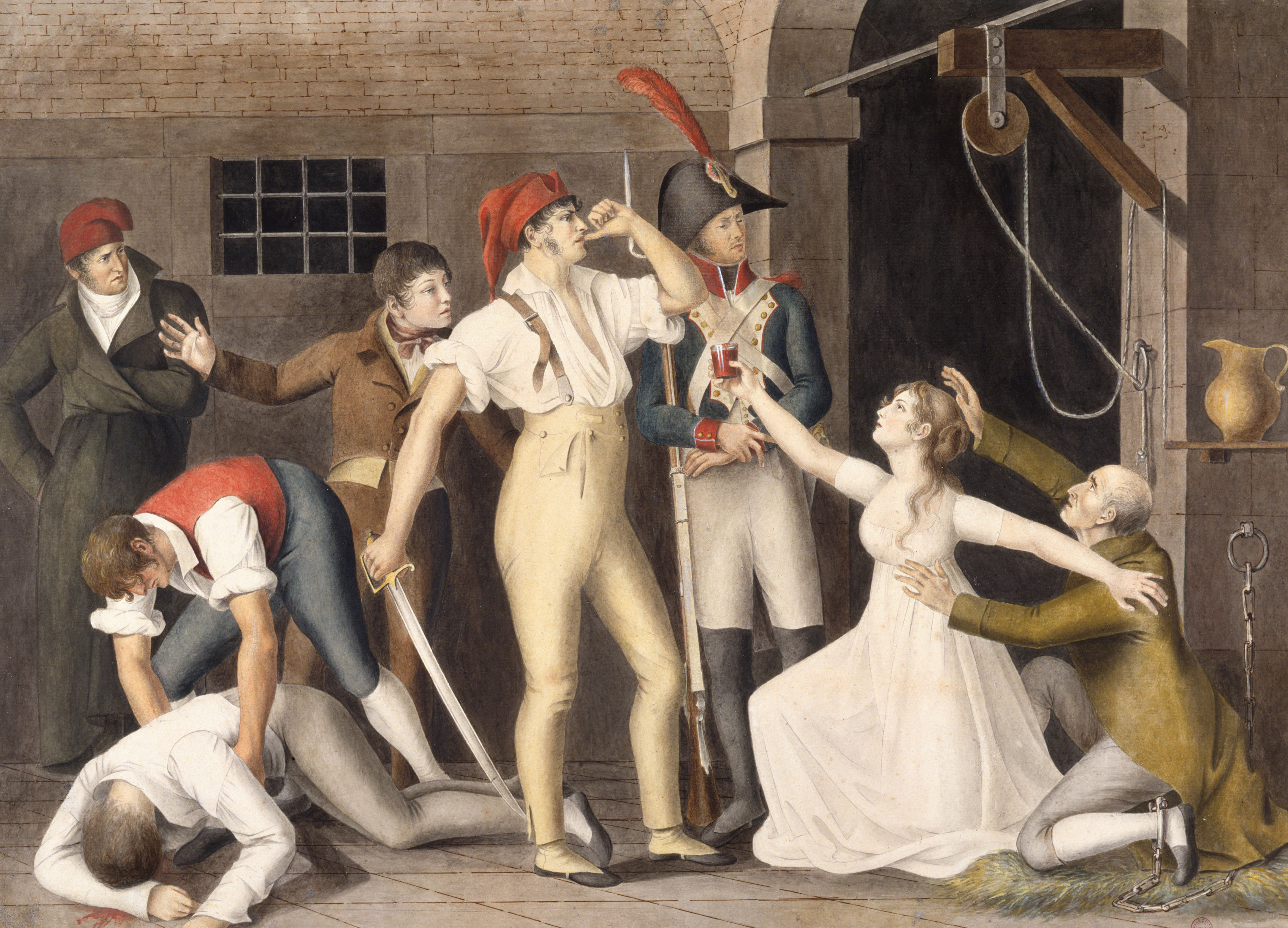 Mademoiselle de Sombreuil buvant un verre de sang pour sauver la vie de son père durant les massacres de Septembre. Dessin anonyme, vers 1792.